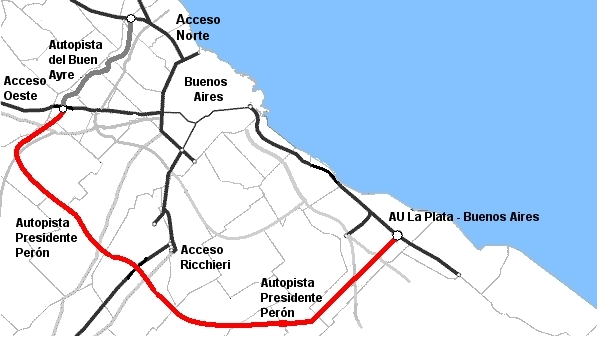 Futura Autopista Presidente Perón, cuyo inicio de construcción se prevee para mediados de 2009.